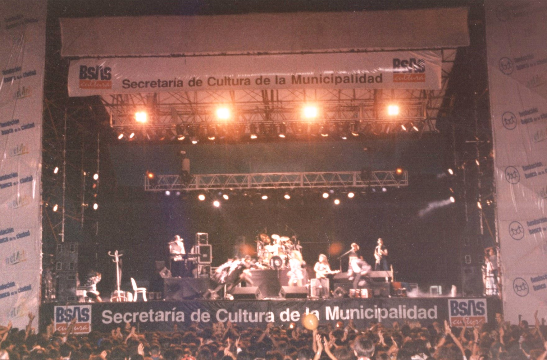 Festival organizado por la Secretaría de Cultura de la Ciudad de Buenos Aires bajo la gestión de Eduardo García Caffi.